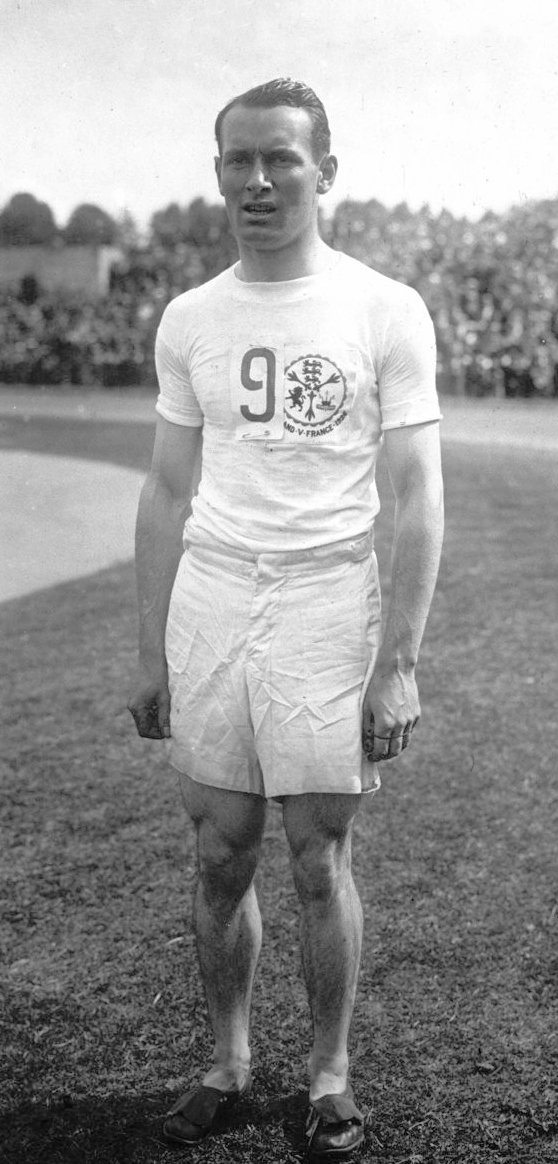 Colombes : match d'athlétisme France Angleterre : Rinkell (anglais) gagnant du 400 m. (portrait) : [photographie de presse] / Agence Meurisse